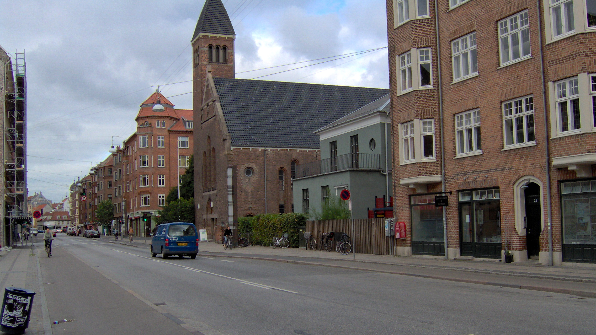 Holmbladsgade i retning mod Amagerbrogade. Taget på hjørnet af Geislersgade/Holmbladsgade. På fotoet er Nathanaels Kirke.